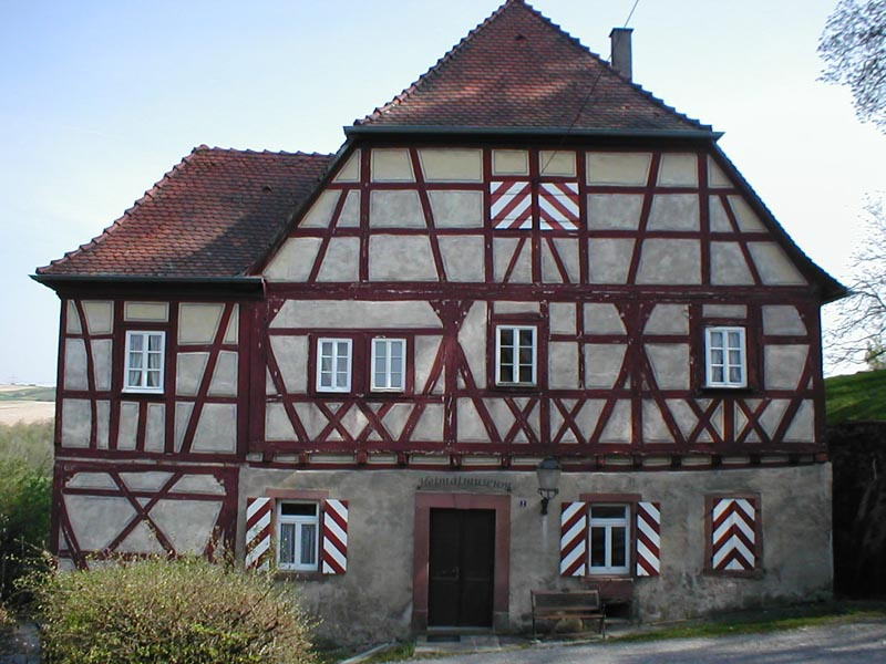 Veste Neidenstein, Wirtschaftsgebäude. Heute Heimatmuseum.